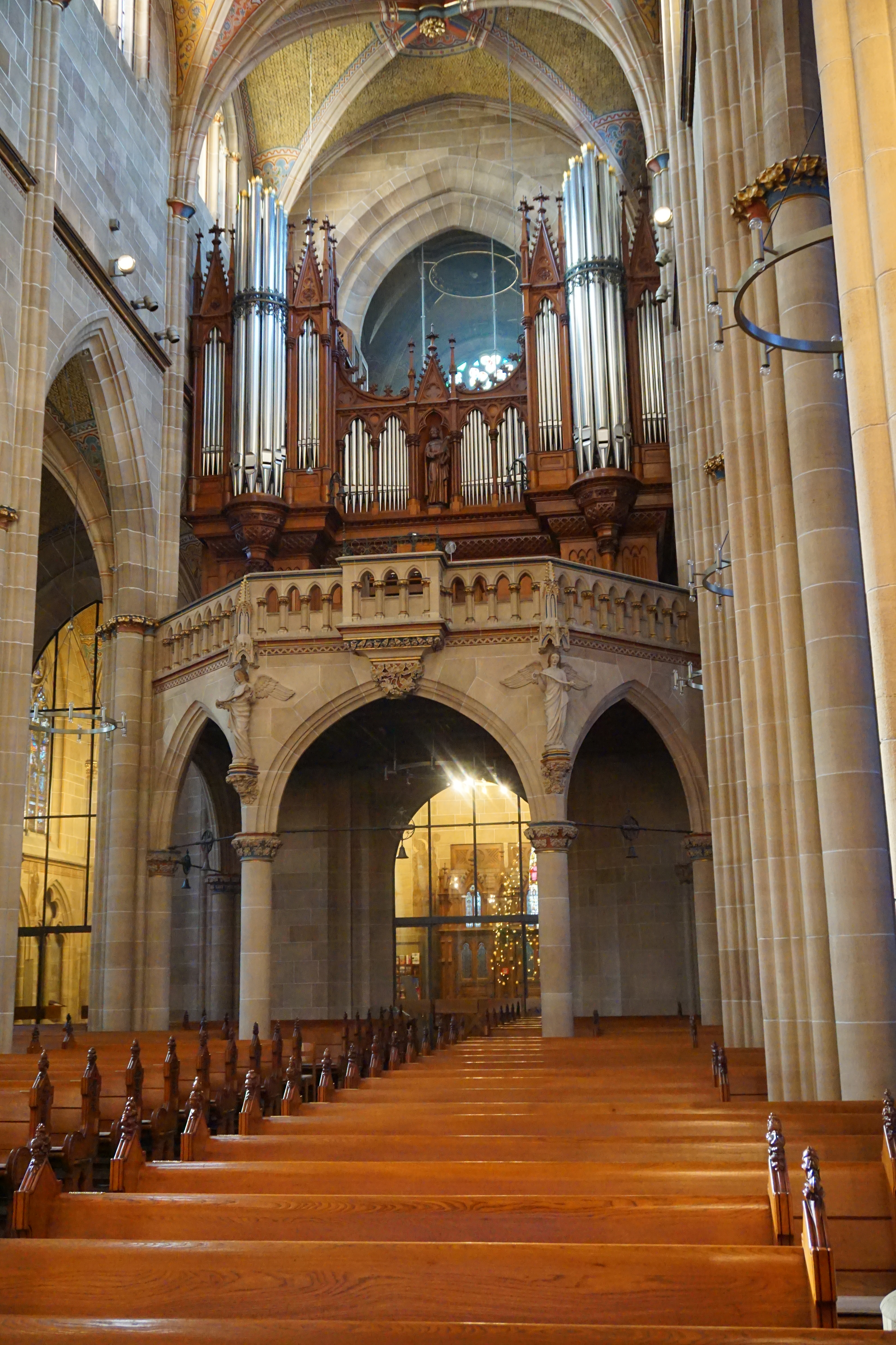 Marienkirche Reutlingen